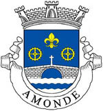 Brsão da Freguesia de Amonde Descrição Ordenação heráldica do brasão e bandeira Publicada no Diário da República, III Série de 31/07/2002 Armas - Escudo de azul, com uma ponte de um arco, de prata, lavrada de negro, firmada nos flancos e movente de uma campanha ondada de prata e azul de três tiras e encimada por uma flor-de-lis e duas rodas de engenho, tudo de ouro e alinhadas em roquete. Coroa mural de prata de três torres. Listel branco, com a legenda em maiúsculas a negro : “ AMONDE “. Fonte Sérgio Horta Licença Autoria do brasão e bandeira Caro Senhor, Gostaria de saber se os brasões que tem no seu site estão no domínio público ou se estão protegidos por direitos de autor. Estou a participar na WIkipédia em português e gostaria de ilustrar os artigos sobre freguesias potuguesas com brasões como os que tem no seu site. Se estiver de acordo com essa utilização, deve estar informado que qualquer pessoa poderá ter acesso às imagens utilizando-as para qualquer fim legal, incluindo fins comerciais. Se estiver de acordo em colocar as imagens no domínio público, agradecia que me contactasse. Obrigado. Manuel Anastácio Olá, as imagens que estão no meu site são de livre utilização, só gostaria que, se os usa-sem no vosso site, indicassem a página de origem dos mesmos. Cumprimentos Sérgio Horta in